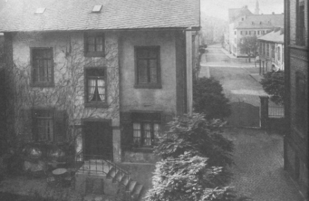 Erstes Schulhaus Marienschule Limburg, Deutschland, 1895